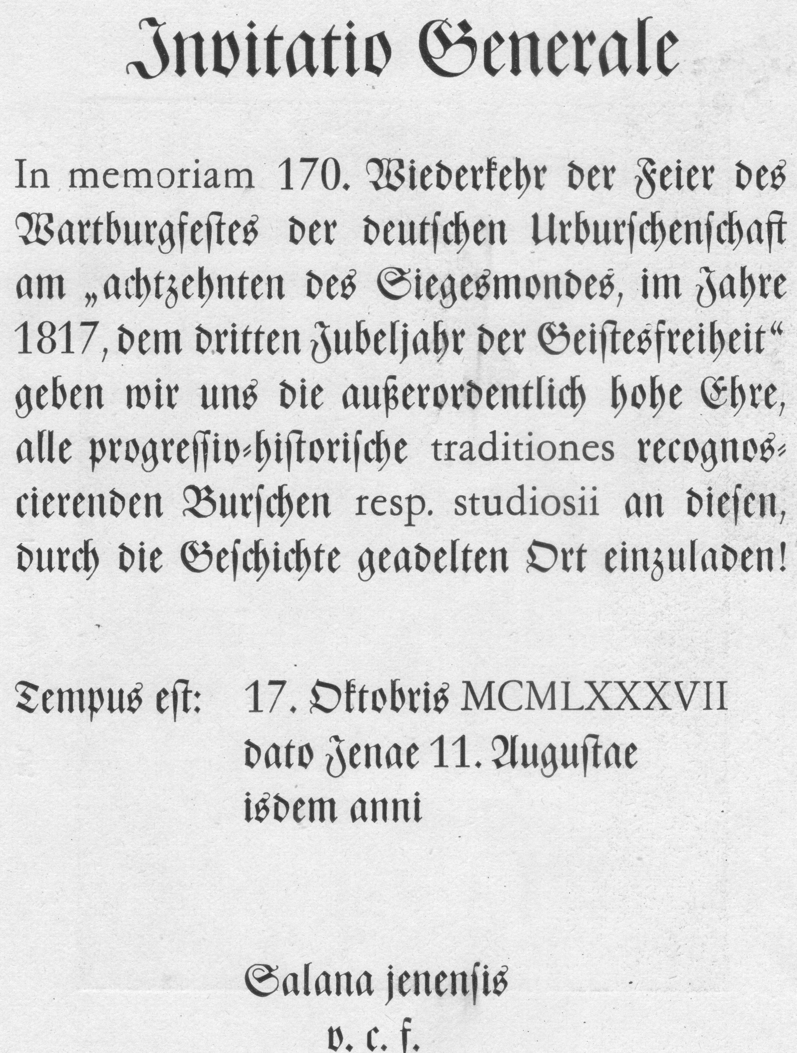 Einladung zum Wartburgfest 1987